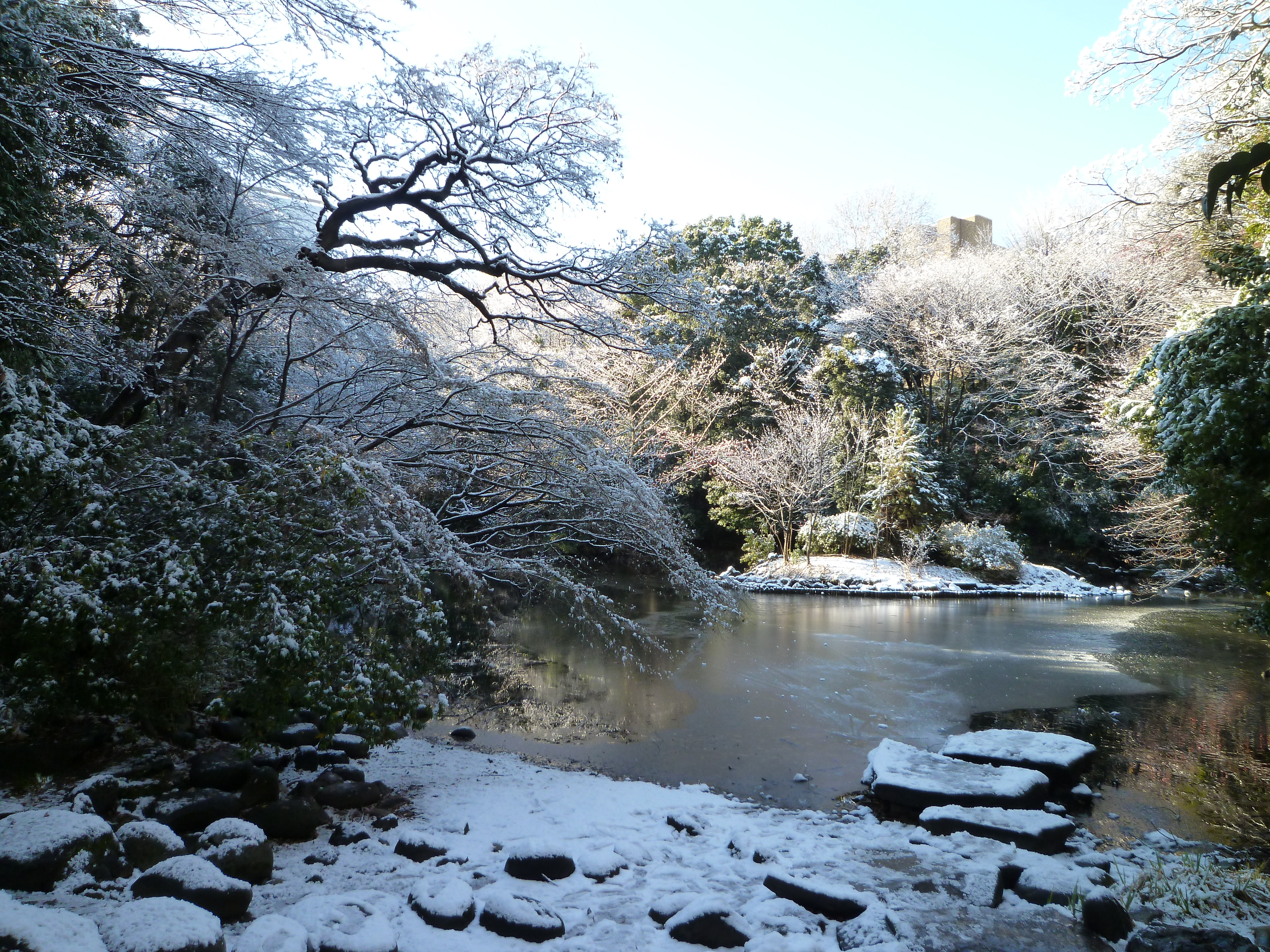 東京大学本郷キャンパス